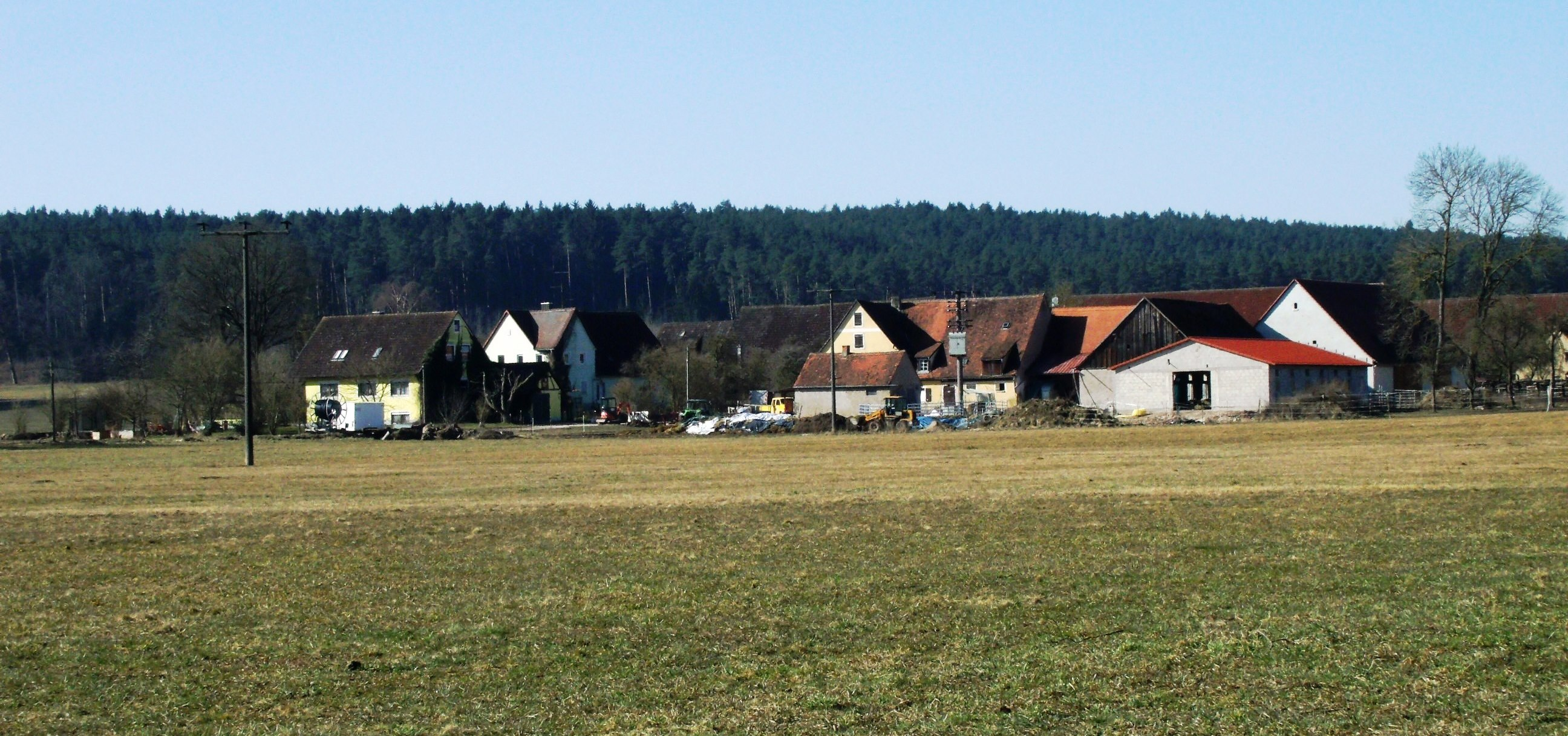 Schönau, Ortsteil der Stadt Herrieden im mittelfränkischen Landkreis Ansbach